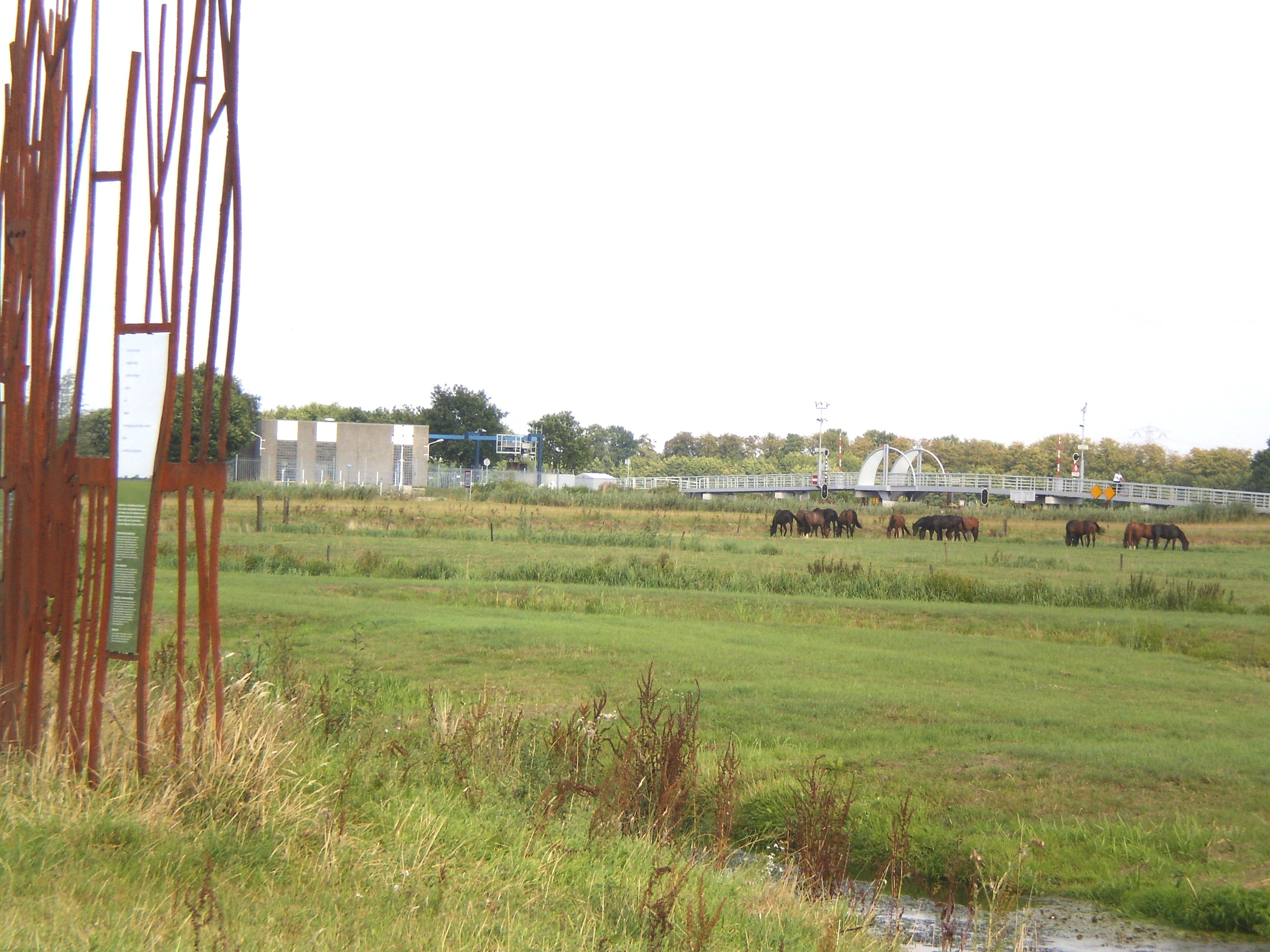 Malebrêge by it keunstwurk wei. Ofbyld oanbean troch Swarte kees